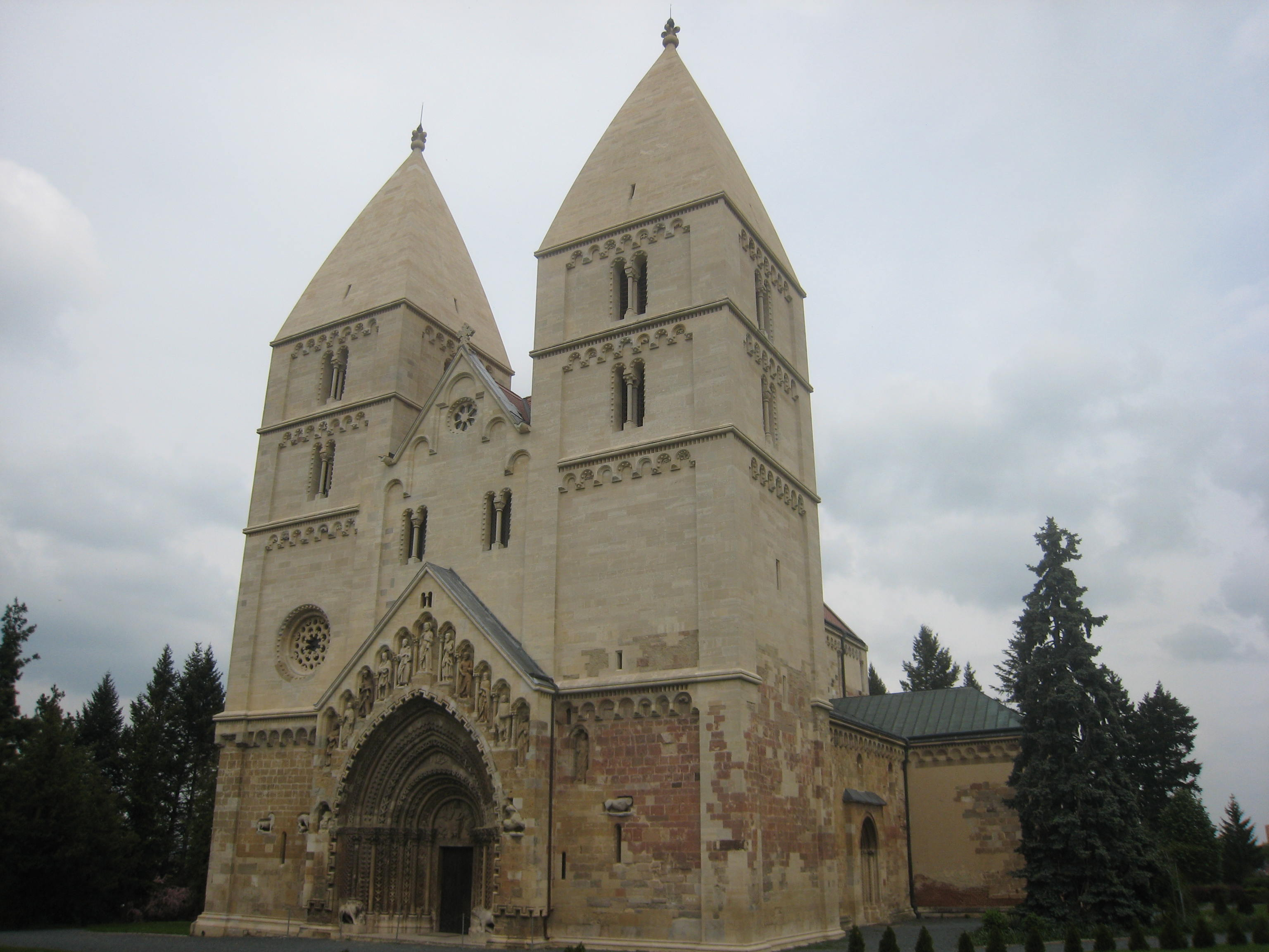 Cerkev sv. Jurija, Ják, Madžarska; pogled na zahodno stran cerkve.